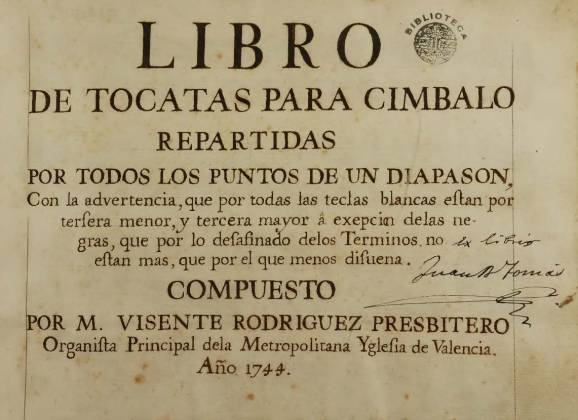 Música manuscrita